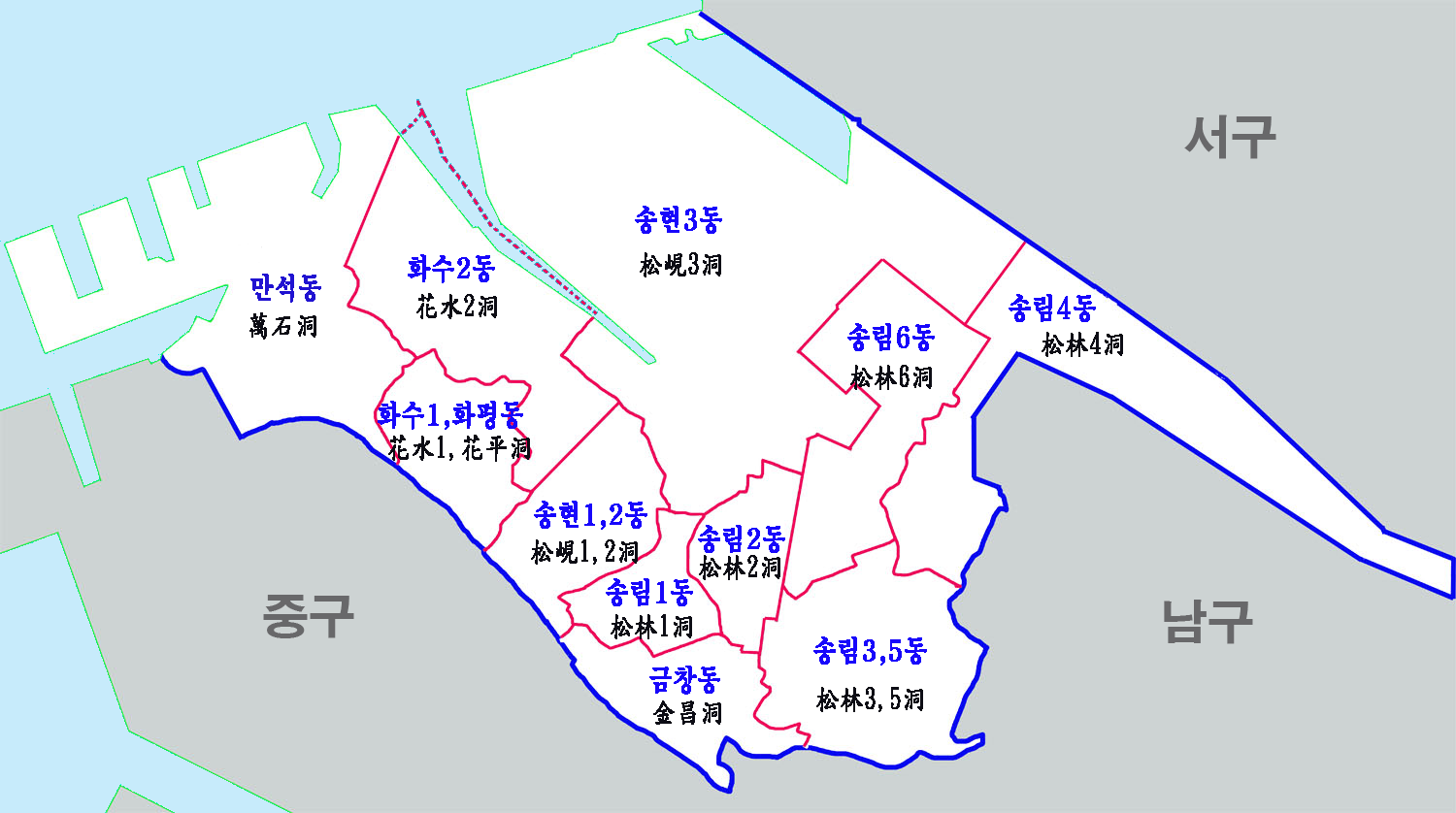 인천시 동구 행정구역도